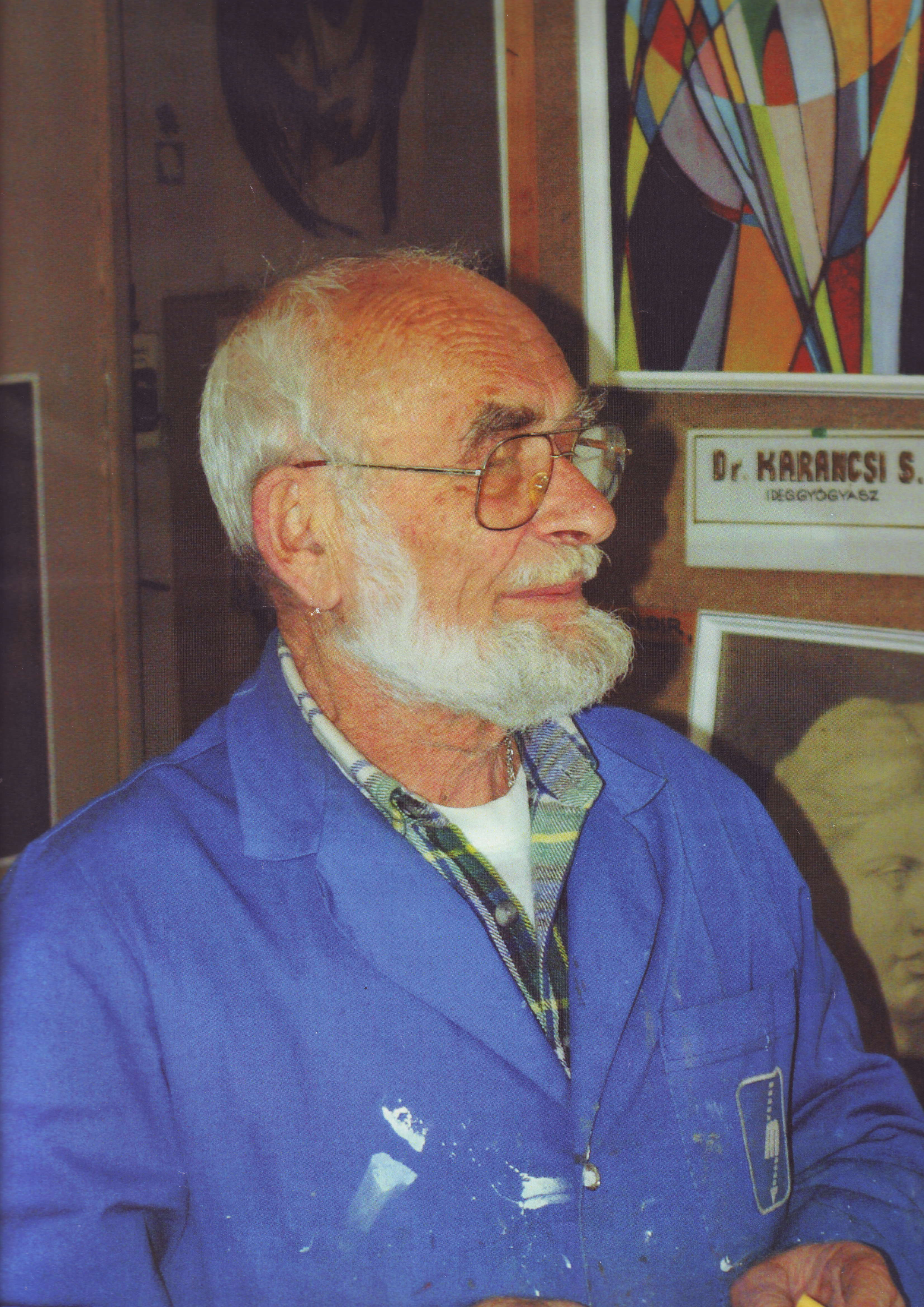 Karancsi Sándor a műteremben.